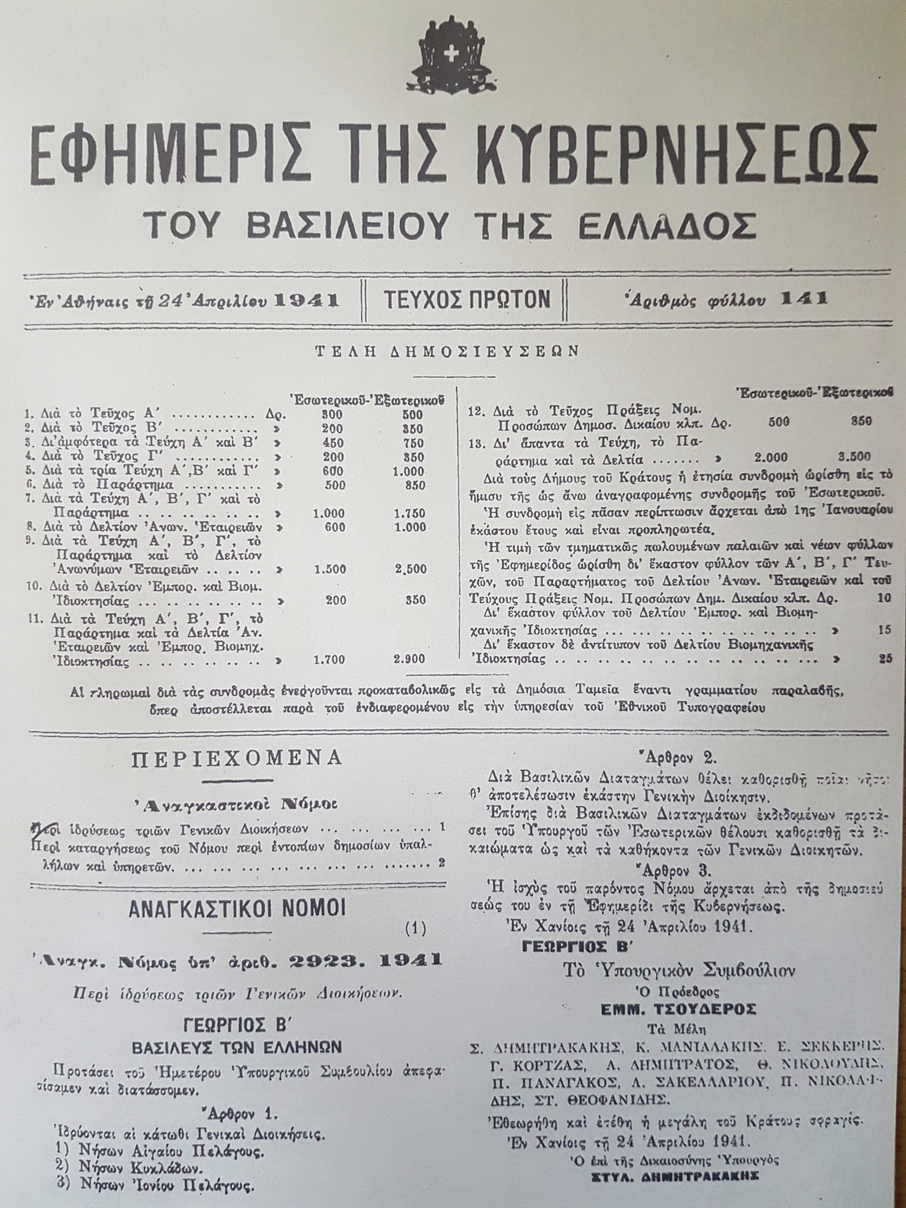 ΦΕΚ 141 1941